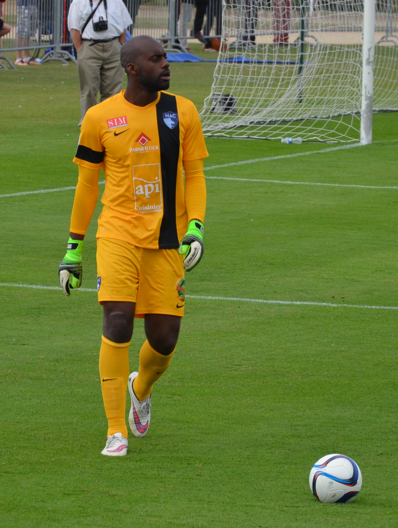 Photographie prise lors du match opposant le Stade rennais au Havre AC en amical au stade Paul-Audrin de Dinard le 8 juillet 2015. Ici, Fabien Farnolle.